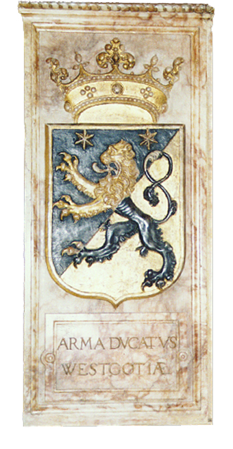 Västergot landskaps vapen vid Gustav vasas grav